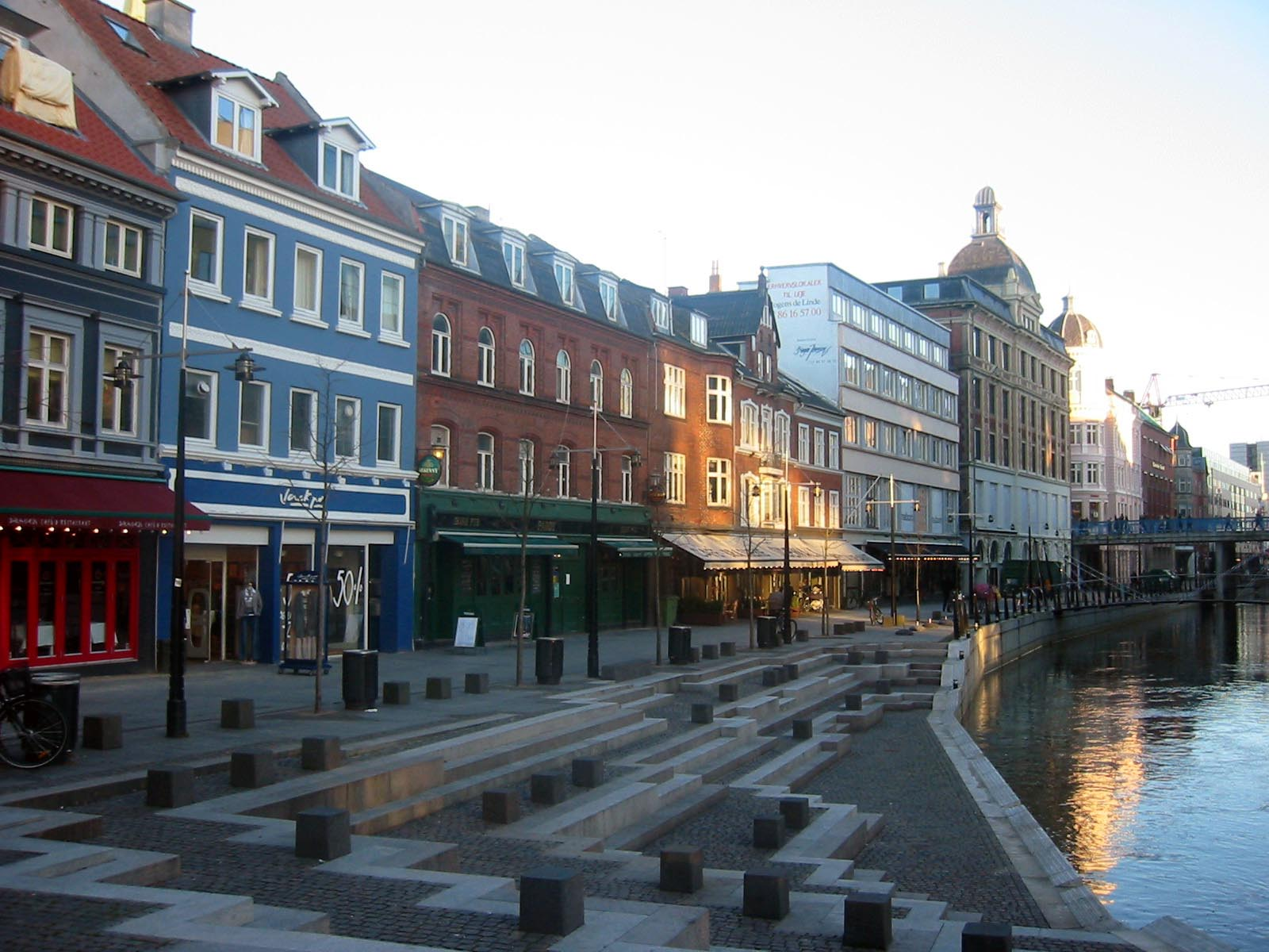 Aarhus DK Gastronimie am Kanal Aufgenommen von pom Albisser im Februar 04